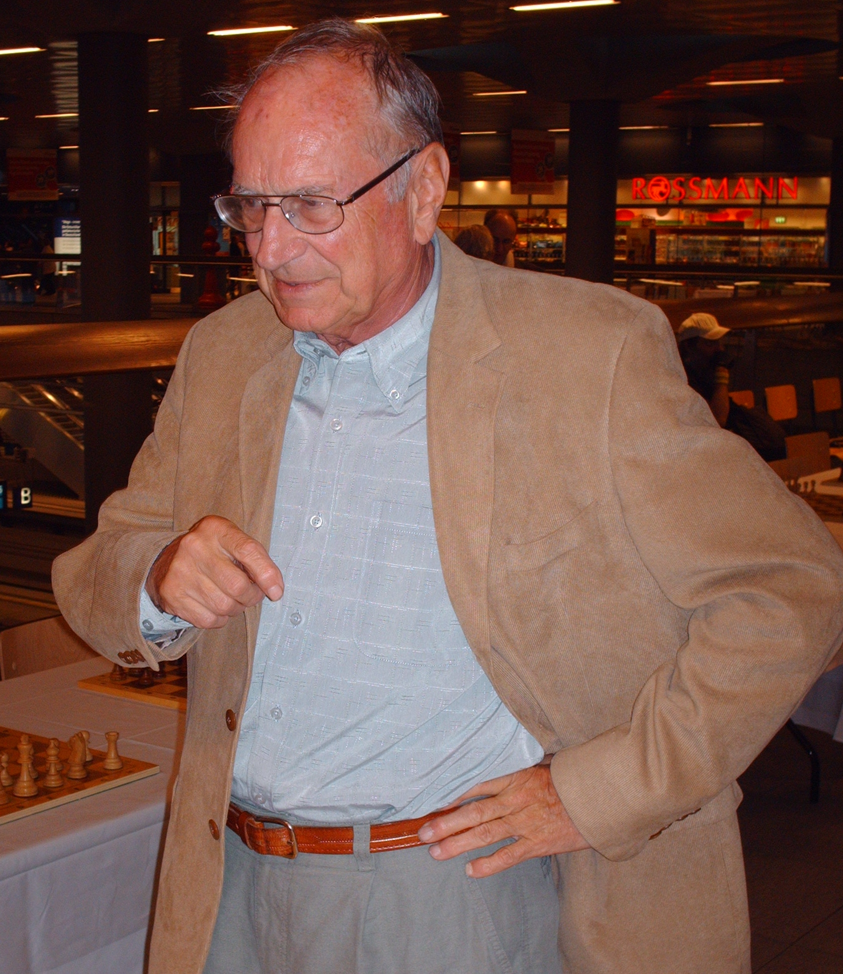 Dr. Fritz Baumbach beim Simultan im Hauptbahnhof Berlin